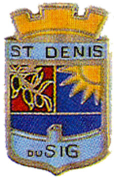 Blason de Saint Denis du Sig (Algerie)